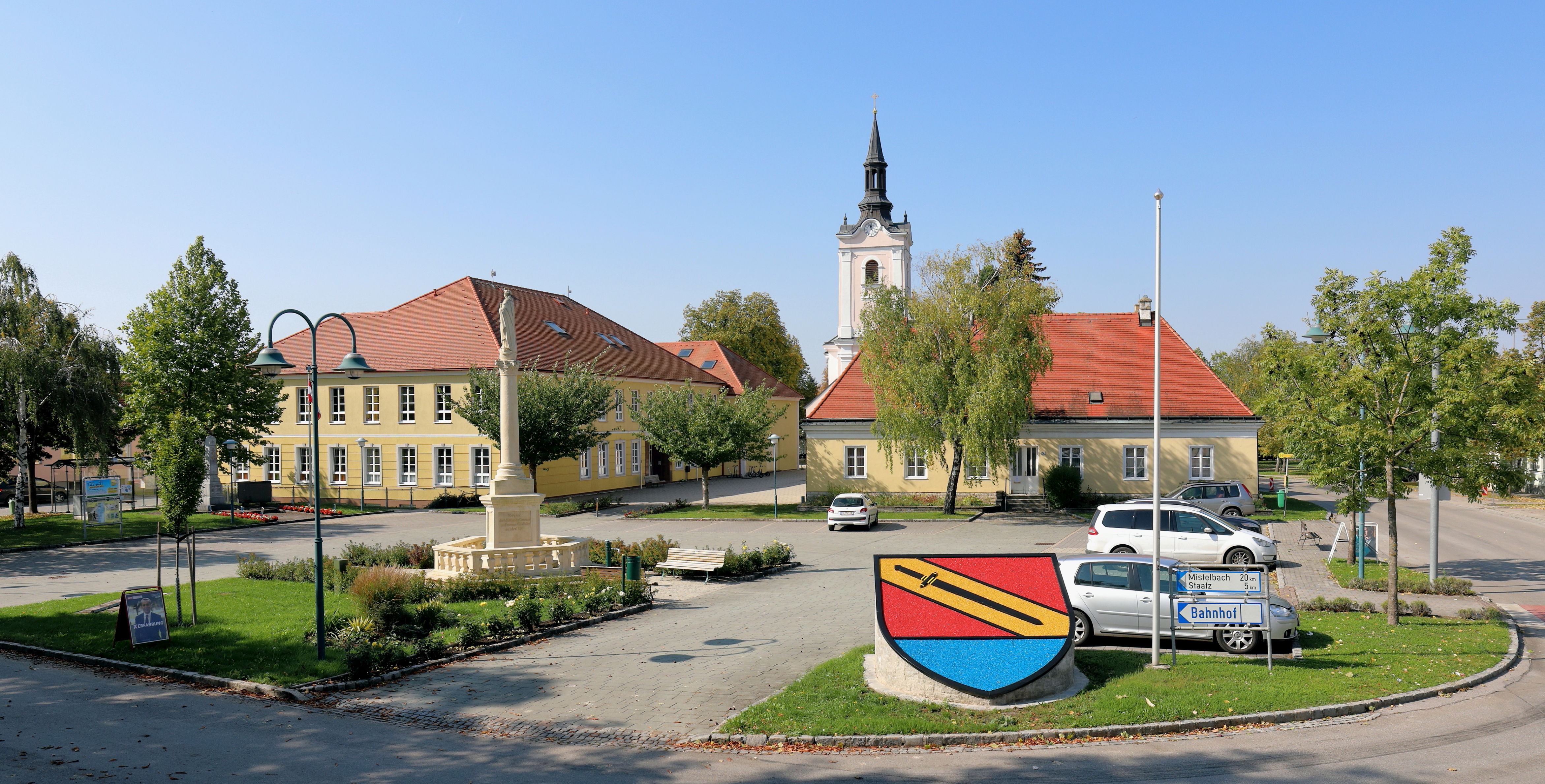 Ortszentrum der niederösterreichischen Marktgemeinde Neudorf im Weinviertel, die bis 2019 Neudorf bei Staatz sich bezeichnete.Im Vordergrund die in den 1850er Jahren errichtete Maria-Immaculata-Säule, dahinter die Schule (1826/27 errichtet?) und rechts der Pfarrhof und hinter diesem die 1724 errichtete spätbarocke Pfarrkirche.